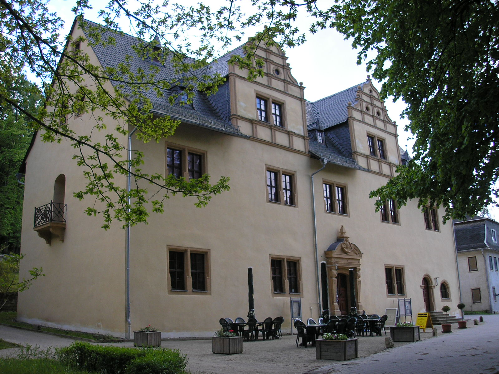 Das Jagdhaus neben der Klosterruine Paulinzella (Thüringen).